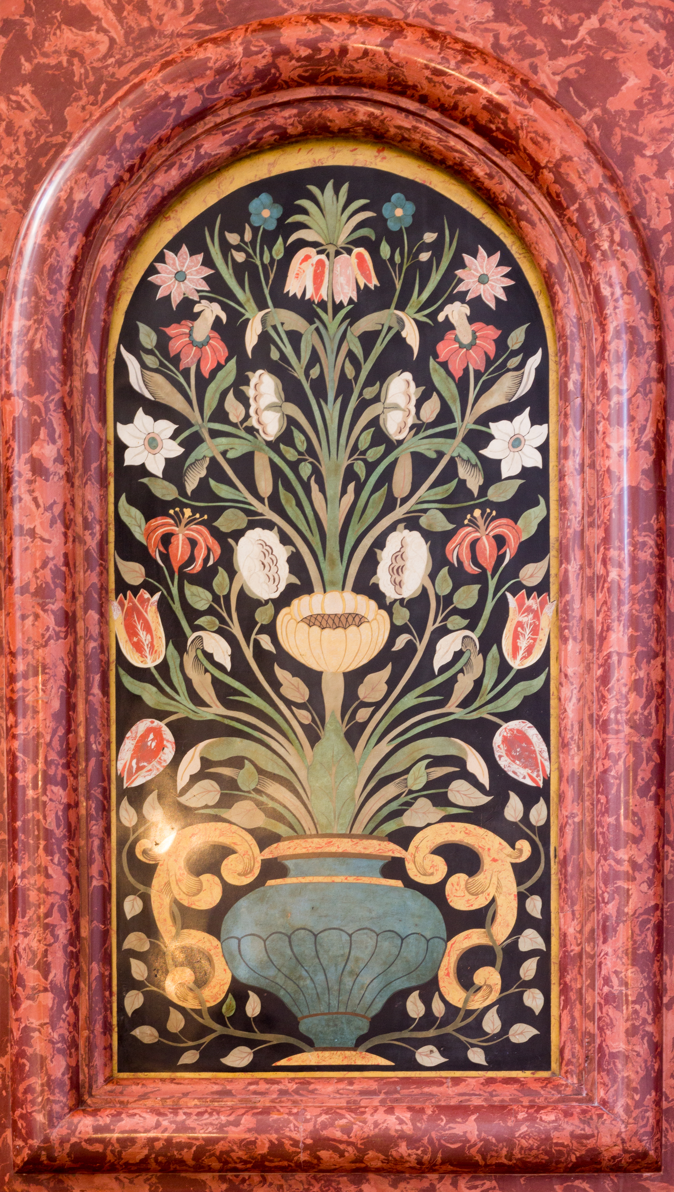 Tafel im Kastulus-Altar